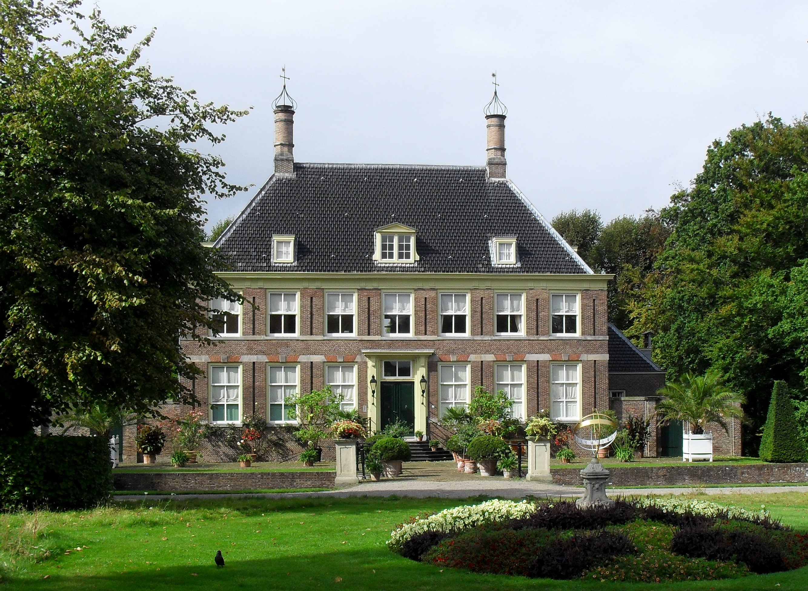 Huis Akerendam